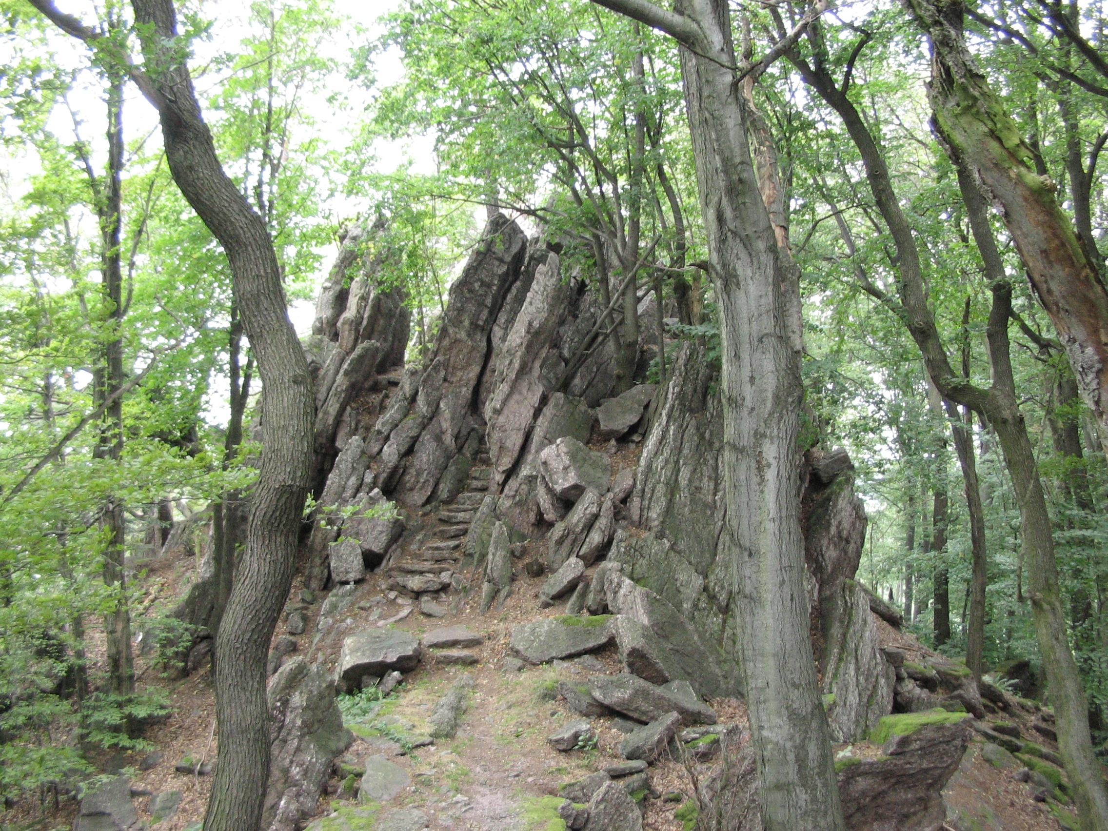 Babí Lom - Stará rozhledna.